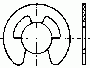 Anneau élastique type E